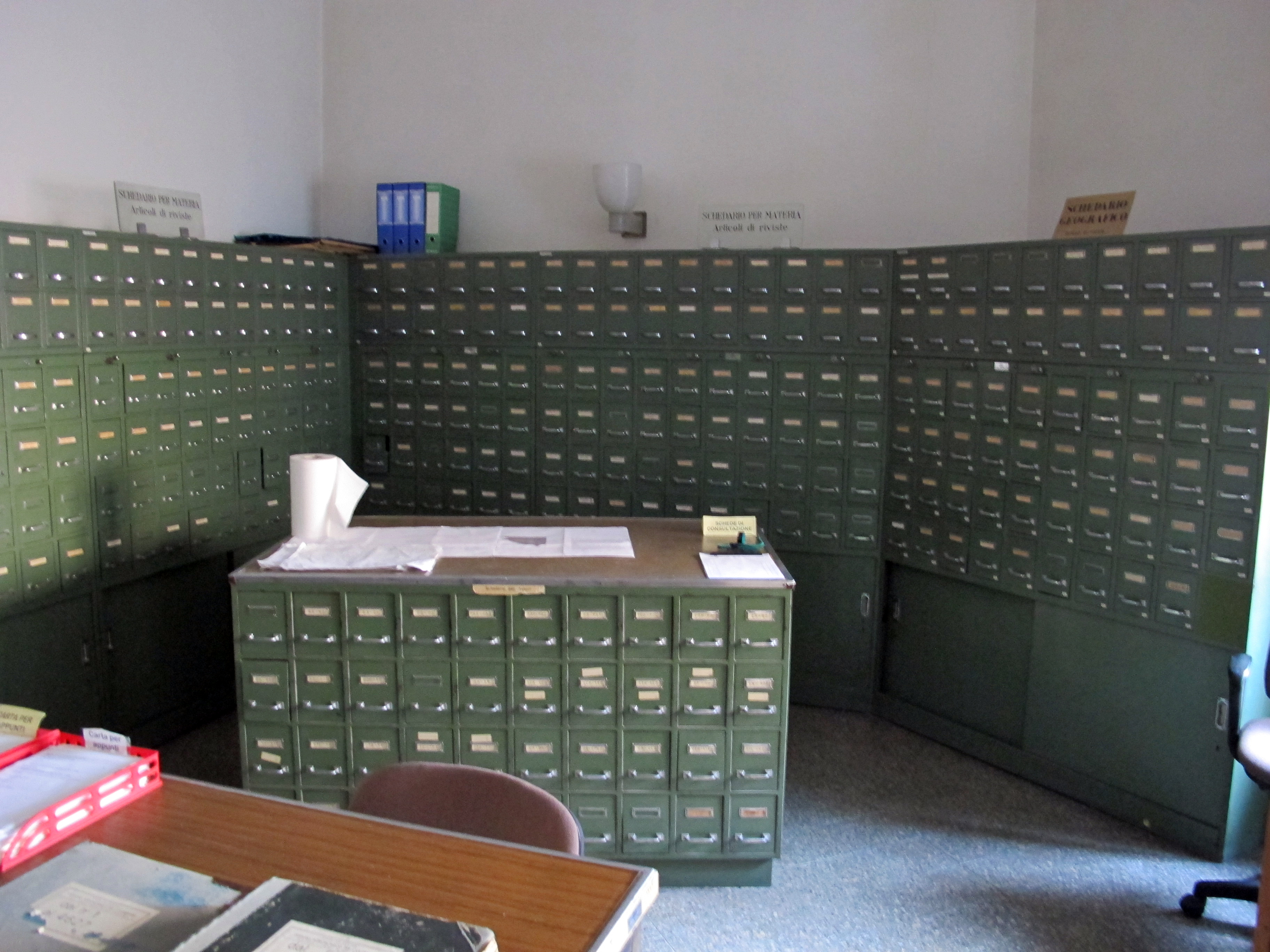 Istituto agronomico per l'oltremare, int., biblioteca, schedario